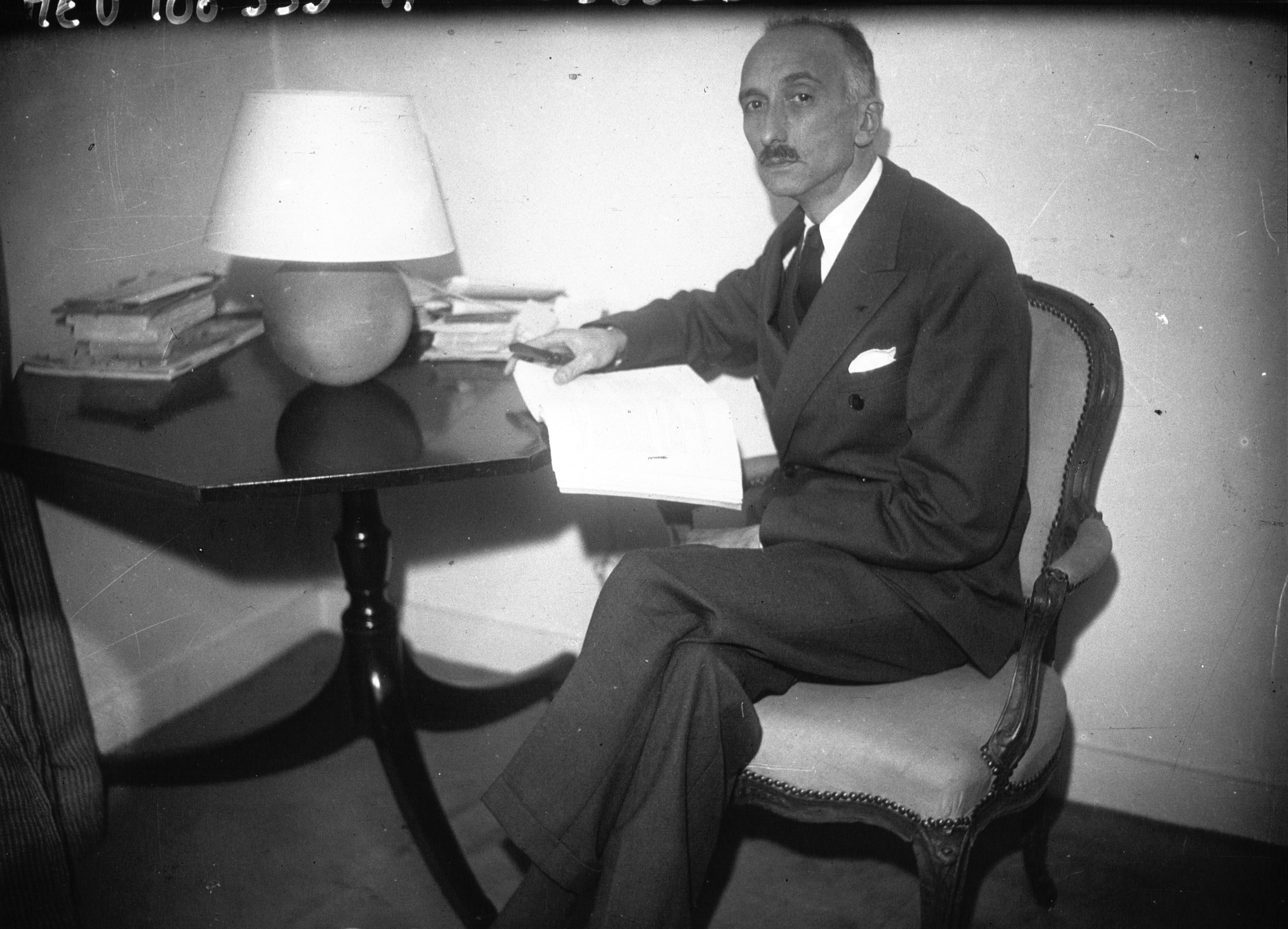 François Mauriac chez lui en 1933 préparant son discours d'entrée à l'Académie française.